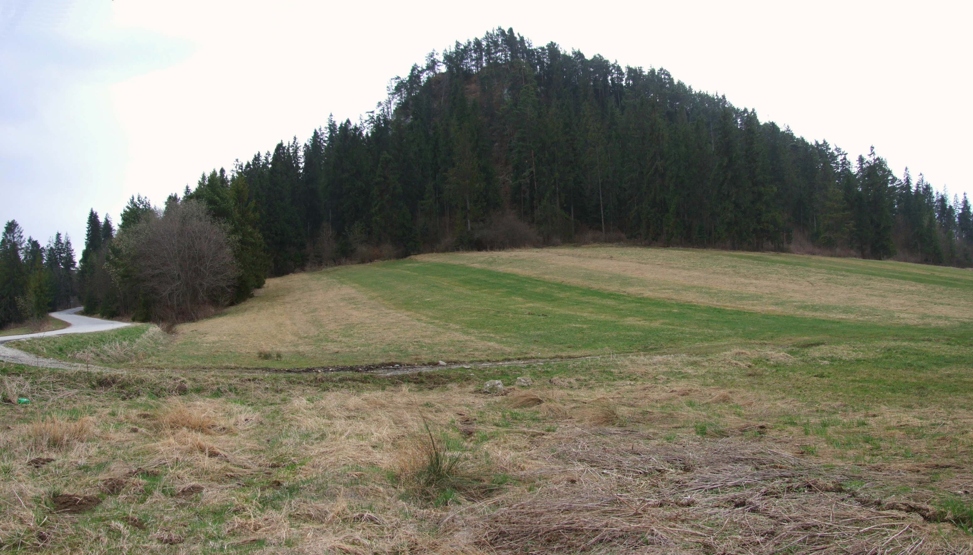 Czerwona Skała w Dursztynie